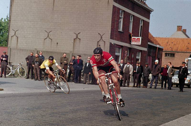 Willy Bocklant in een Belgische wielerkoers 1967